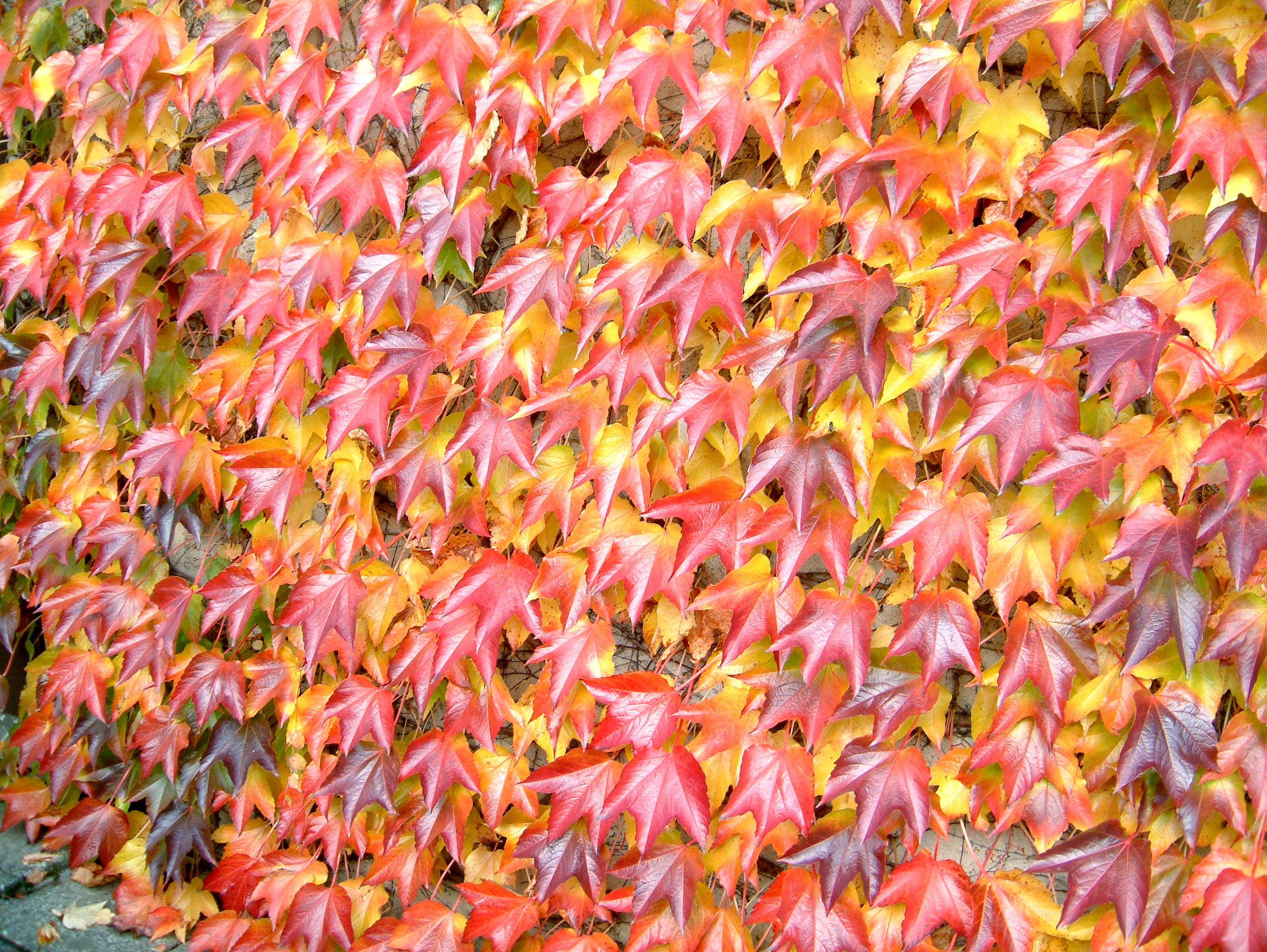 Wilder Wein, Dreispitzige Jungfernrebe (Parthenocissus tricuspidata 'Green Spring')